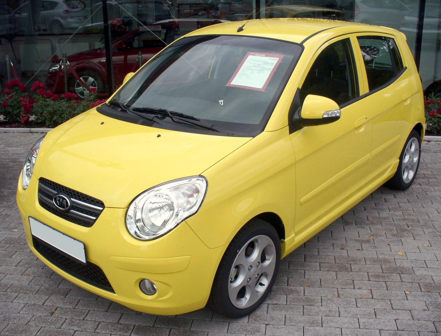 Kia Picanto